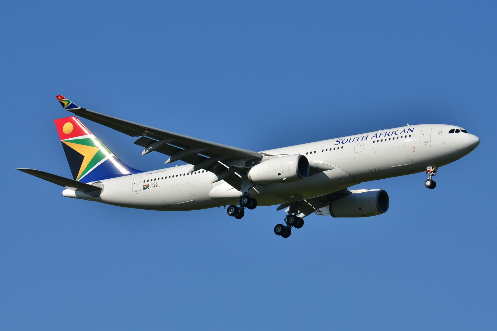 Photo prise à l'aéroport de Toulouse-Blagnac (LFBO) en France. Picture take at Toulouse-Blagnac Airport (LFBO) in France.